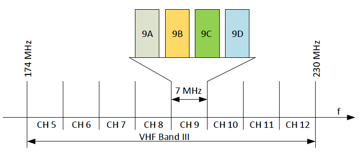 DAB Channels